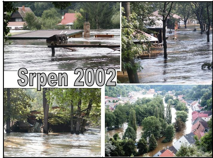 Česky: Rozvodněná Lužnice v okolí Tábora